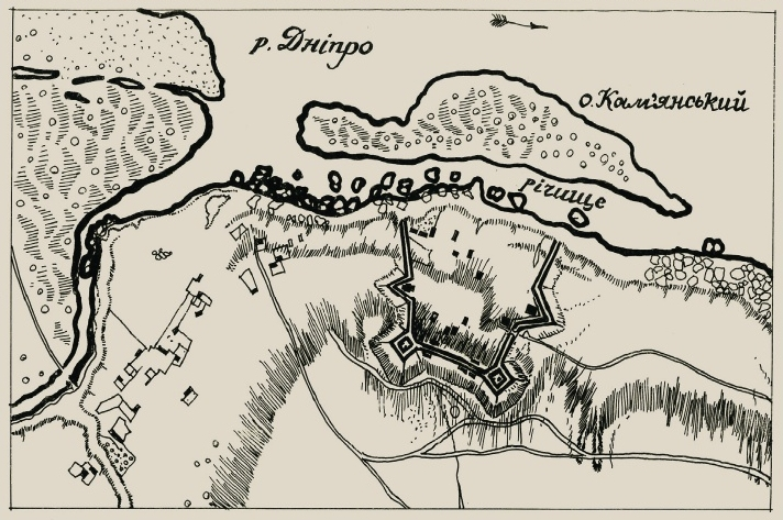 Кам'янський ретраншемент 1778 року